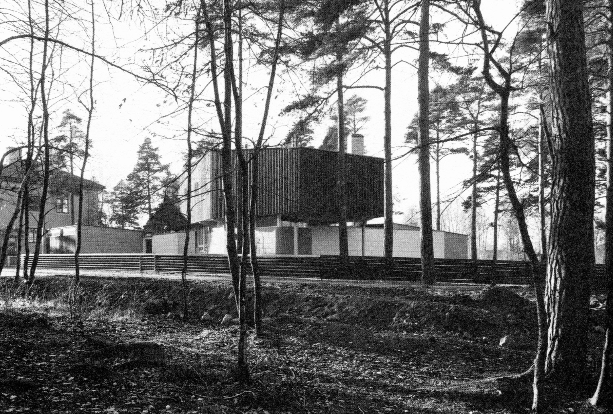 Villa Tesdorpf, arkitekt Ralph Erskine